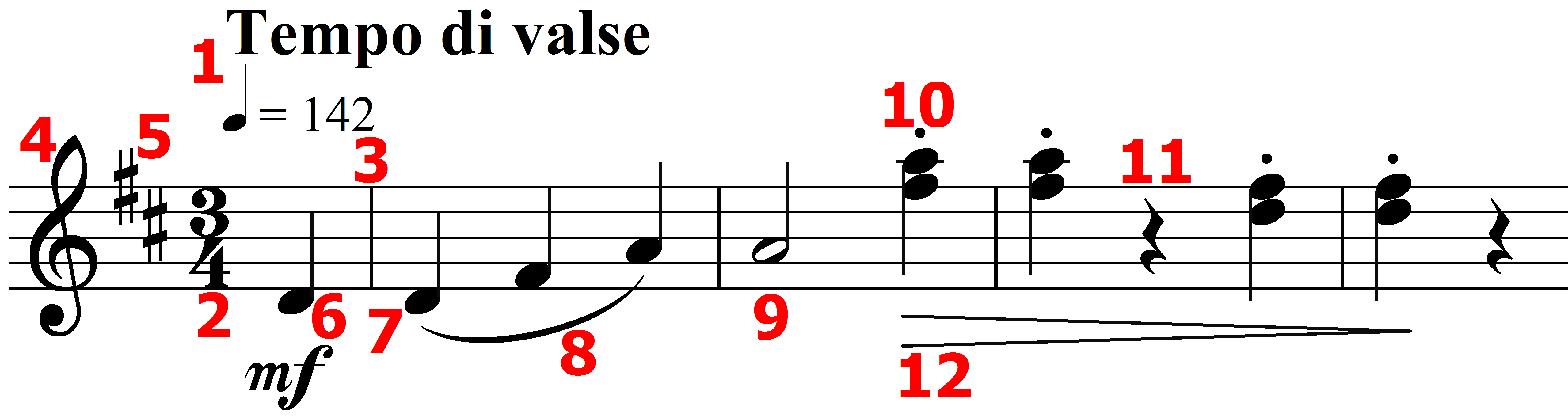 Notationserklärung